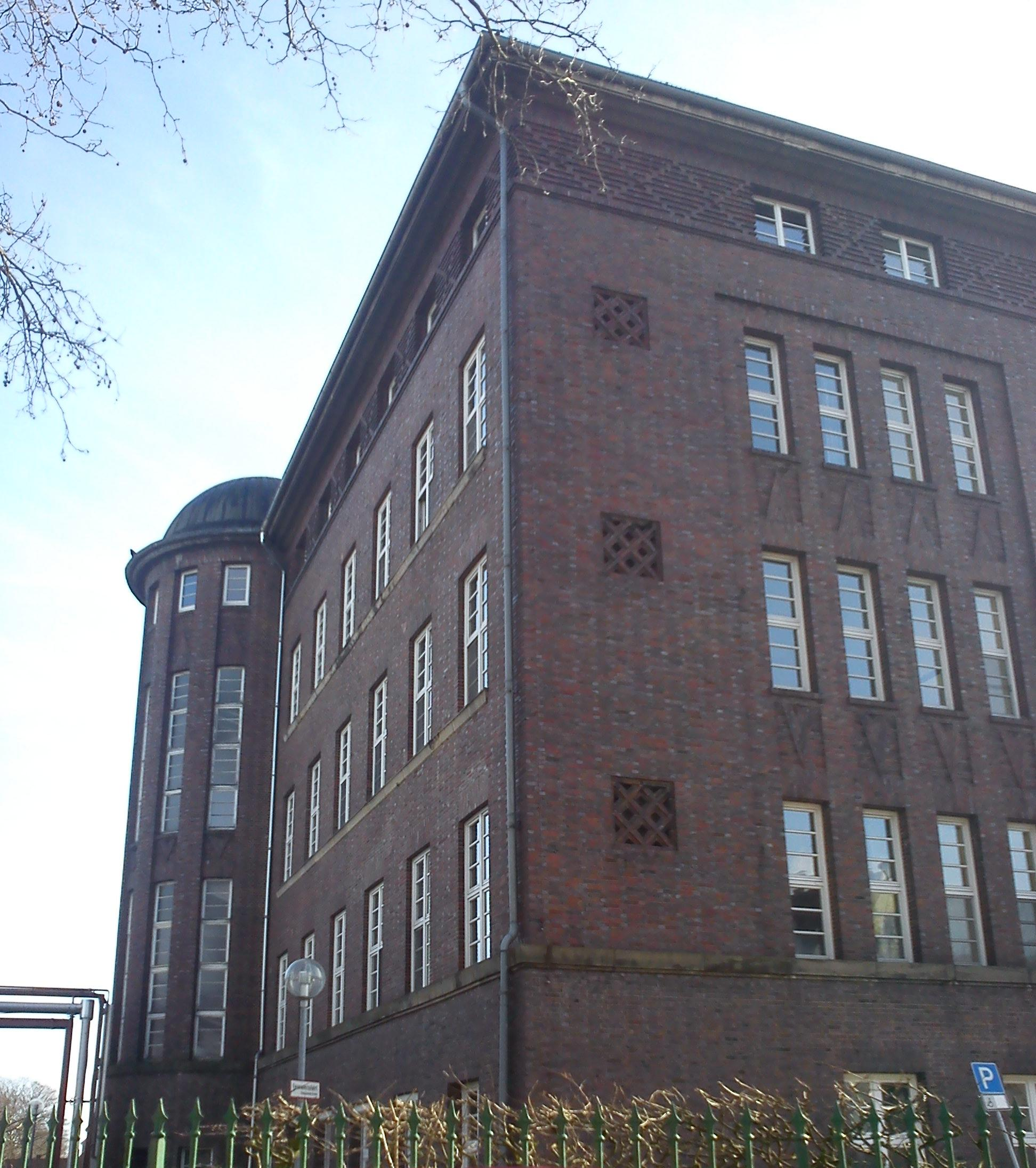 Alte Medizin.Klinik, Gebäude Nr. 42 lt. LfD